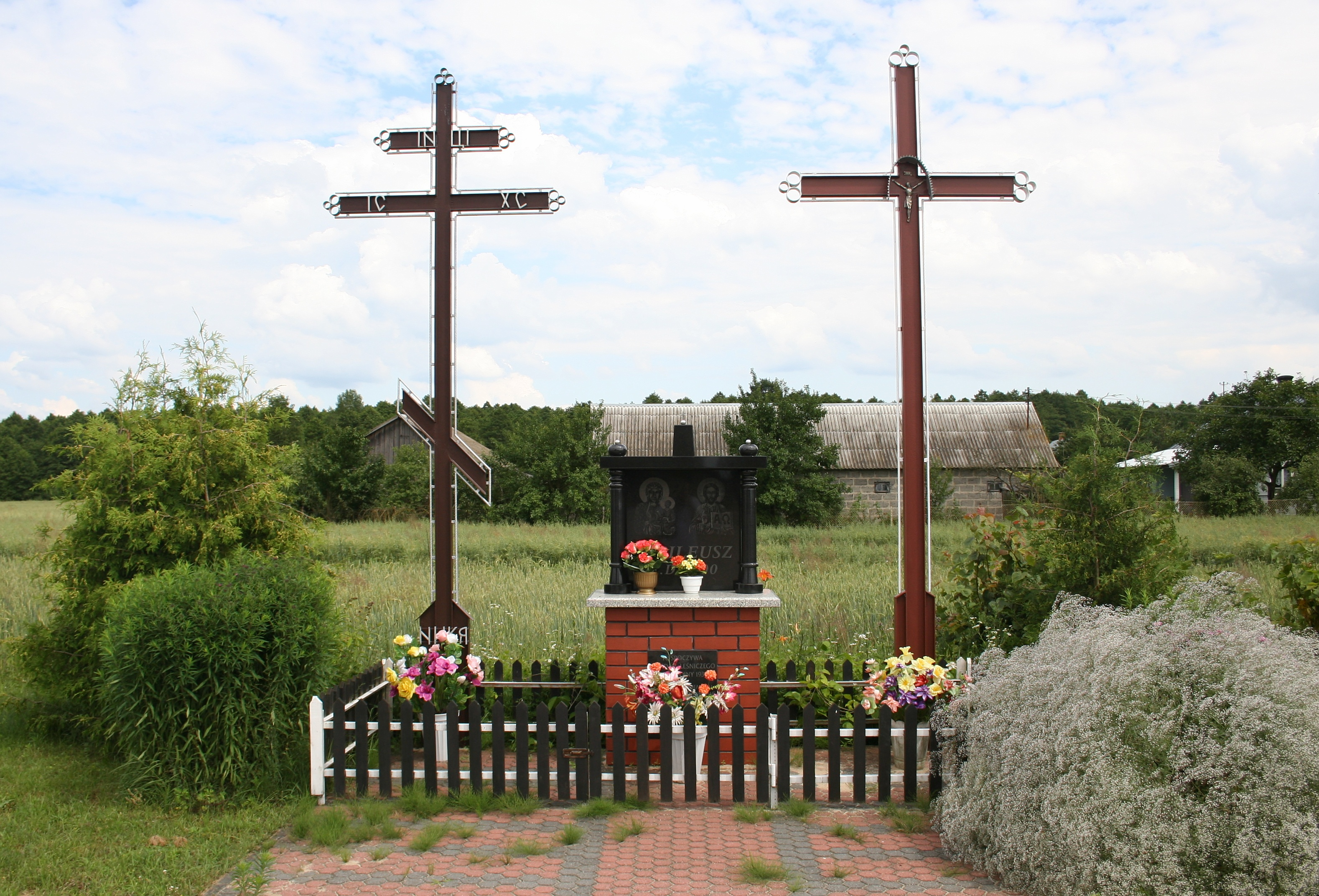 krzyże w miejscowości Olendry w gminie Siemiatycze, woj. podlaskie. Pod nimi znajduje się tablica informująca, że tu spoczywa żona leśniczego, która była ofiarą wojny w roku 1939.